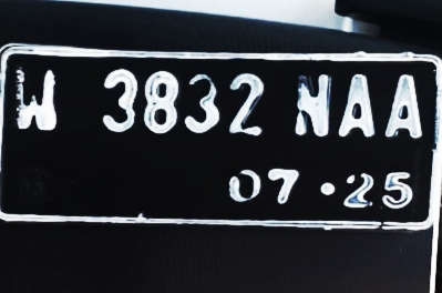 Plat Nomor Kab.Sidoarjo Tiga Huruf - 2020